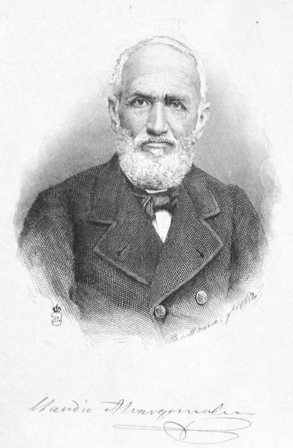 Claudio Alvargonzález, aguafuerte de Bartolomé Maura. Ilustración de Pedro de Novo y Colsón, Historia de la guerra de España en el Pacífico, 1882. Facsímil del autógrafo. Biblioteca Nacional de España.